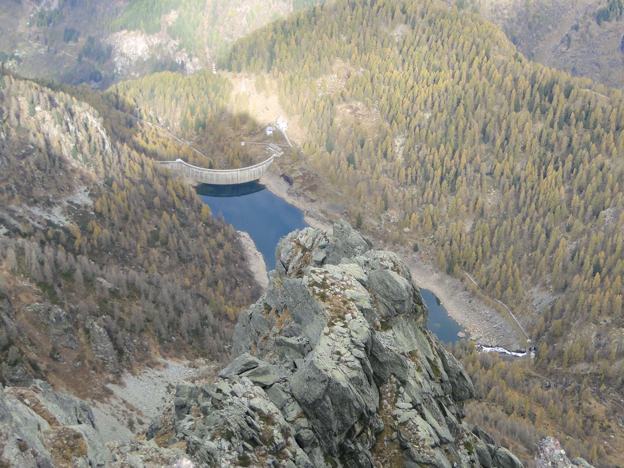 Lago Sardegnana, prealpi Orobie, valle Brembana, Bergamo